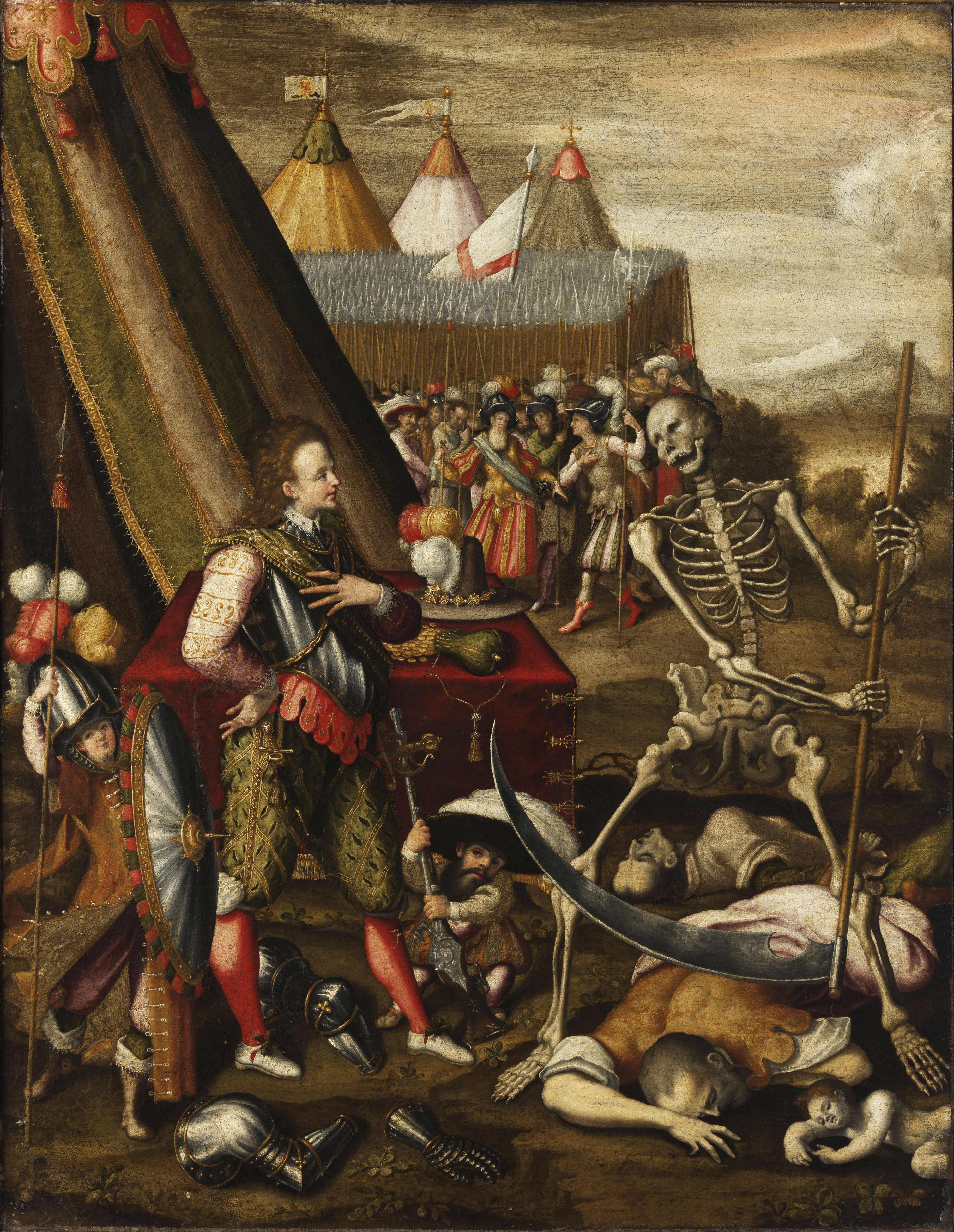 Allegorie des Krieges. Öl auf Leinwand. 73 x 56,5 cm.